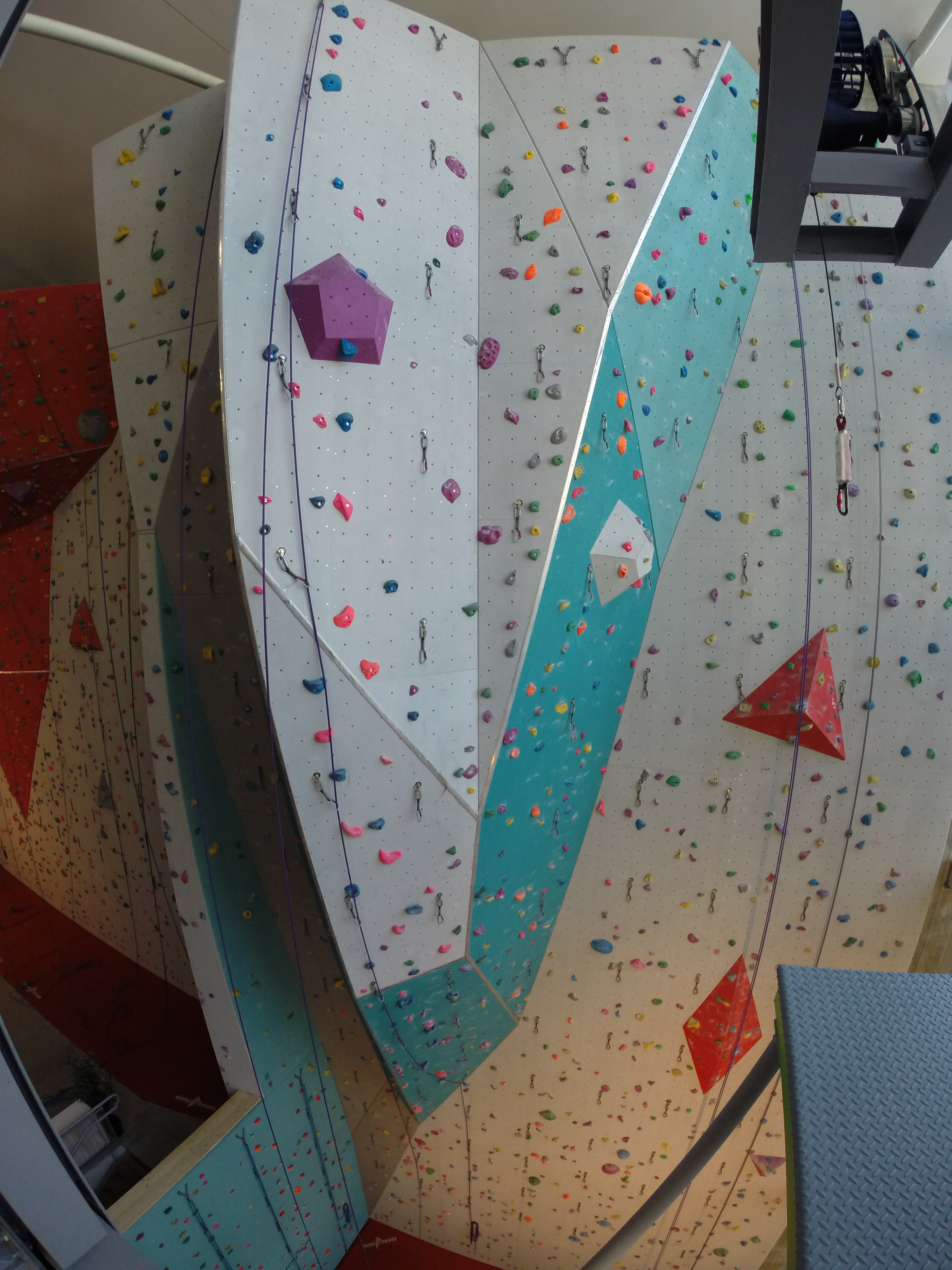 The highest indoor climbing wall in France. Le mur d'Azium à Lyon, à Confluence est haut de 22 mètres. Il est le plus haut mur d'escalade Indoor de france.